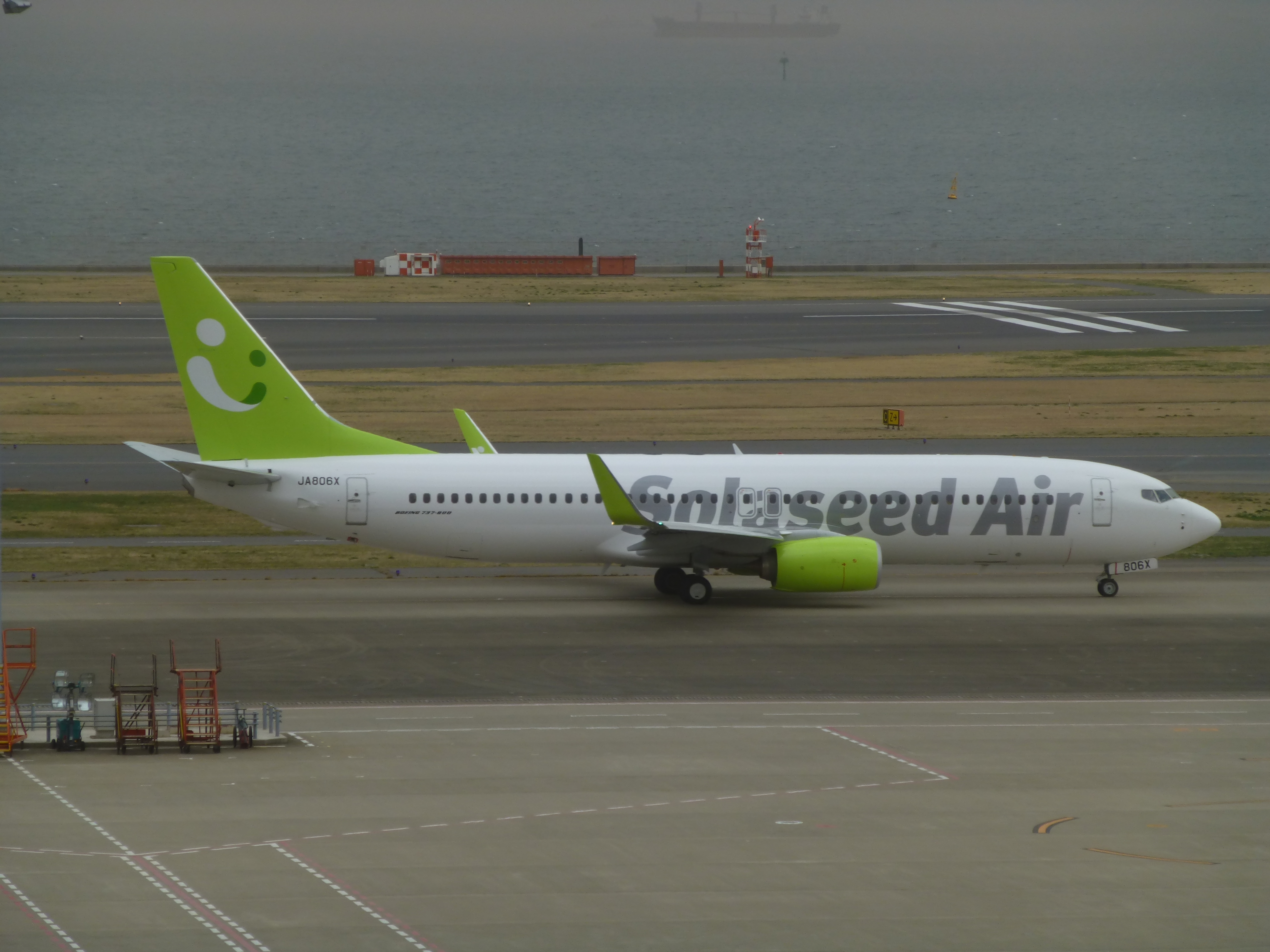 スカイネットアジア航空（ソラシドエア）のボーイング737-86N（JA806X） 日本国東京国際空港で撮影